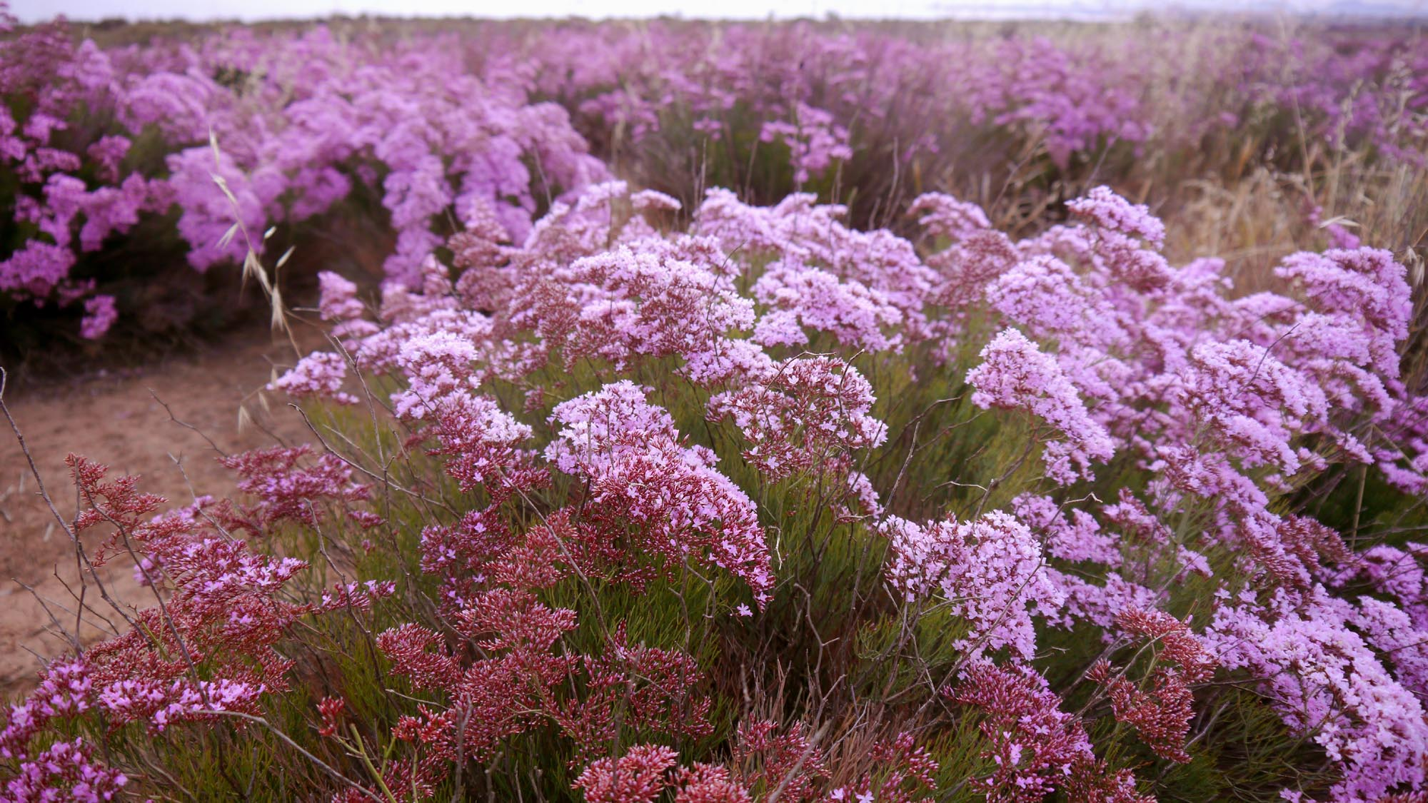 Limonium caesium en floración en abril en el saladar de Lo Poyo, junto al Mar Menor, Cartagena (España).